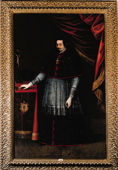 Retrato de Bernardo Luis Cotoner y Ballester (1571-1641)